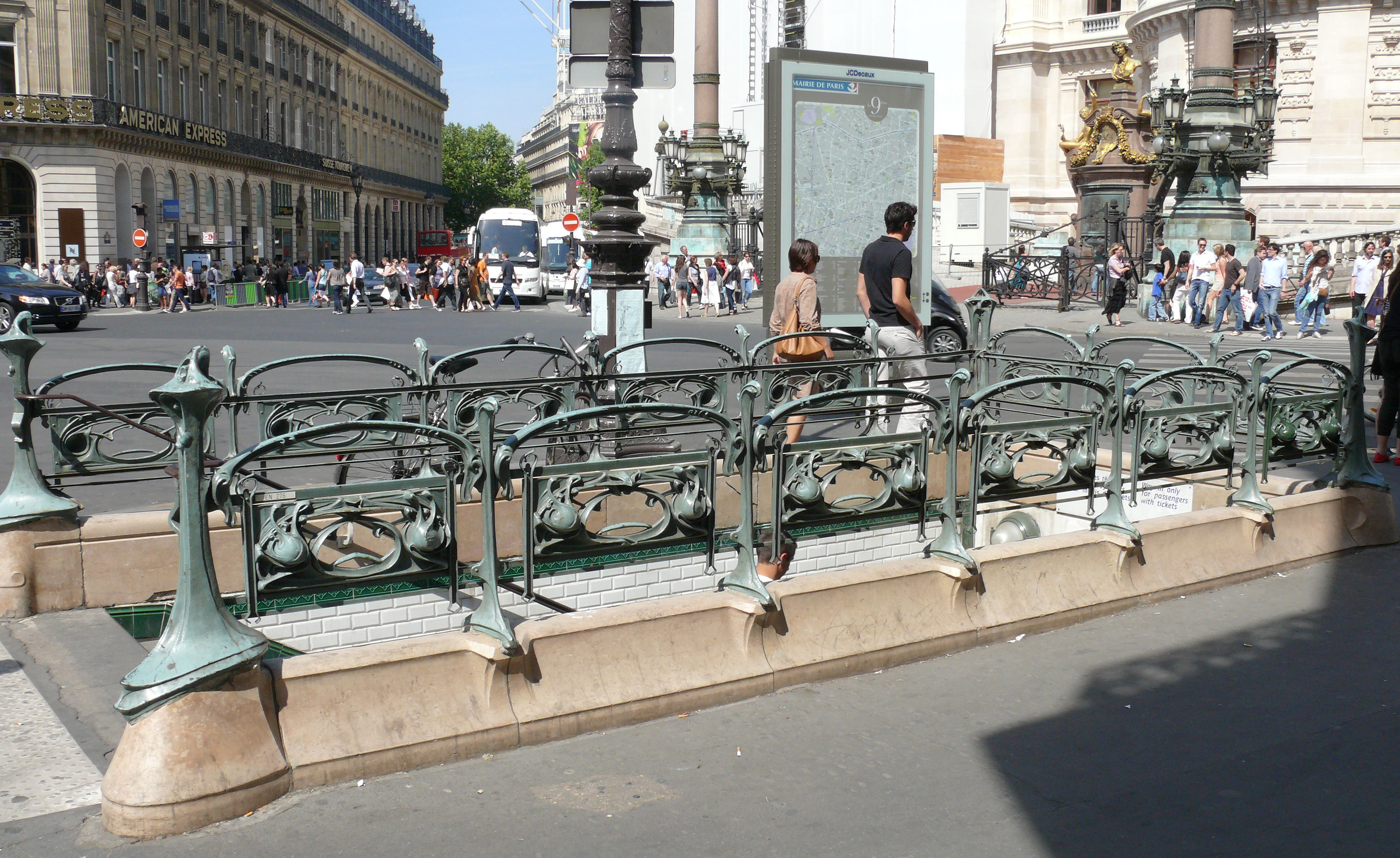 Paris 9ème arrondissement - Edicule Guimard de la station Opéra sur la place Charles-Garnier